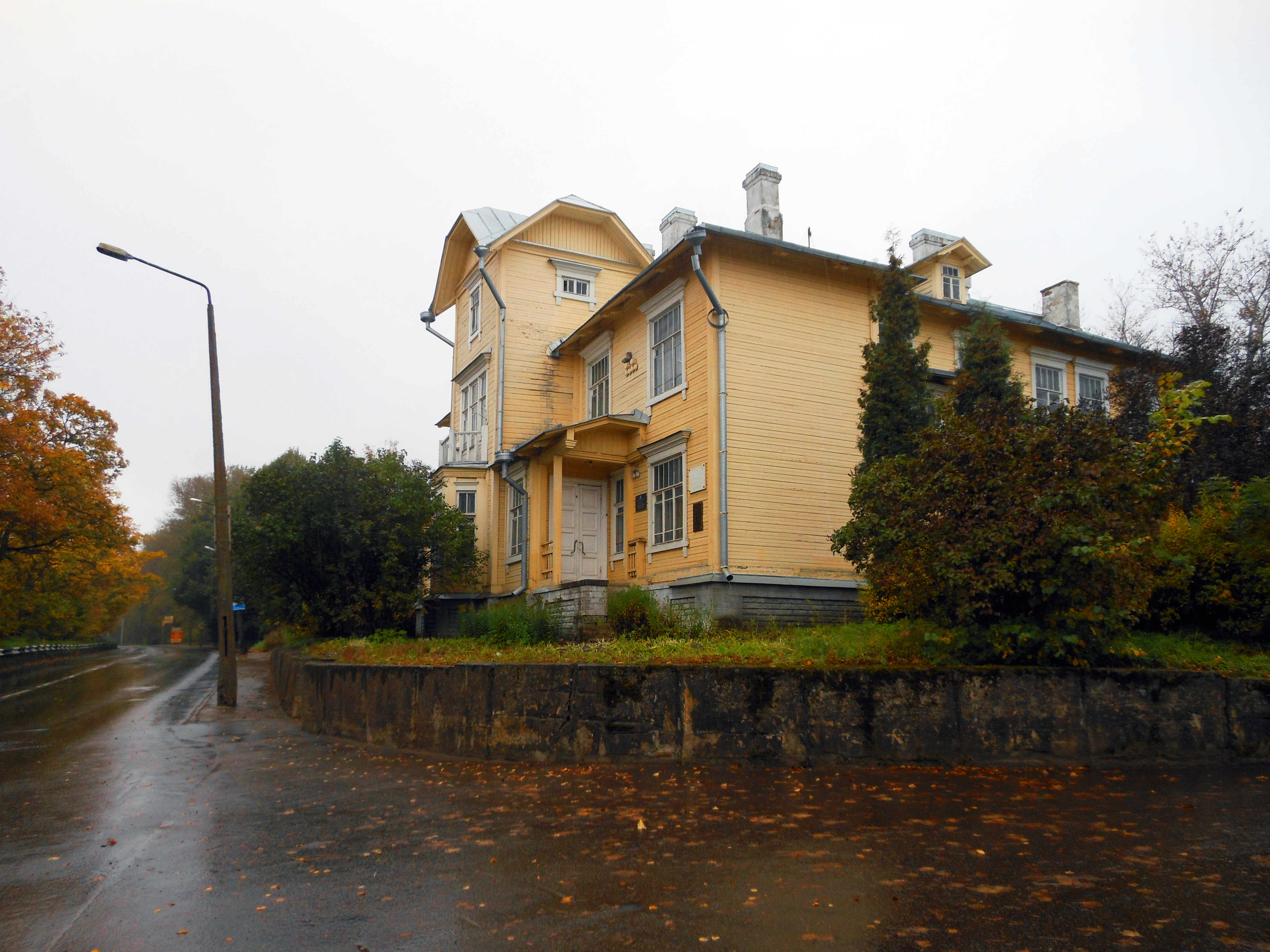 Дом, в котором жил выдающийся советский энергетик Г. О. Графтио, руководивший строительством Волховской ГЭС (Лен.область, Волхов, Октябрьская наб., 27 (55))